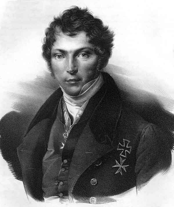 Kurd Wolfgang von Schoening. Reproduktion nach Lithographie von 1829, nach Zeichnung von Franz Krüger